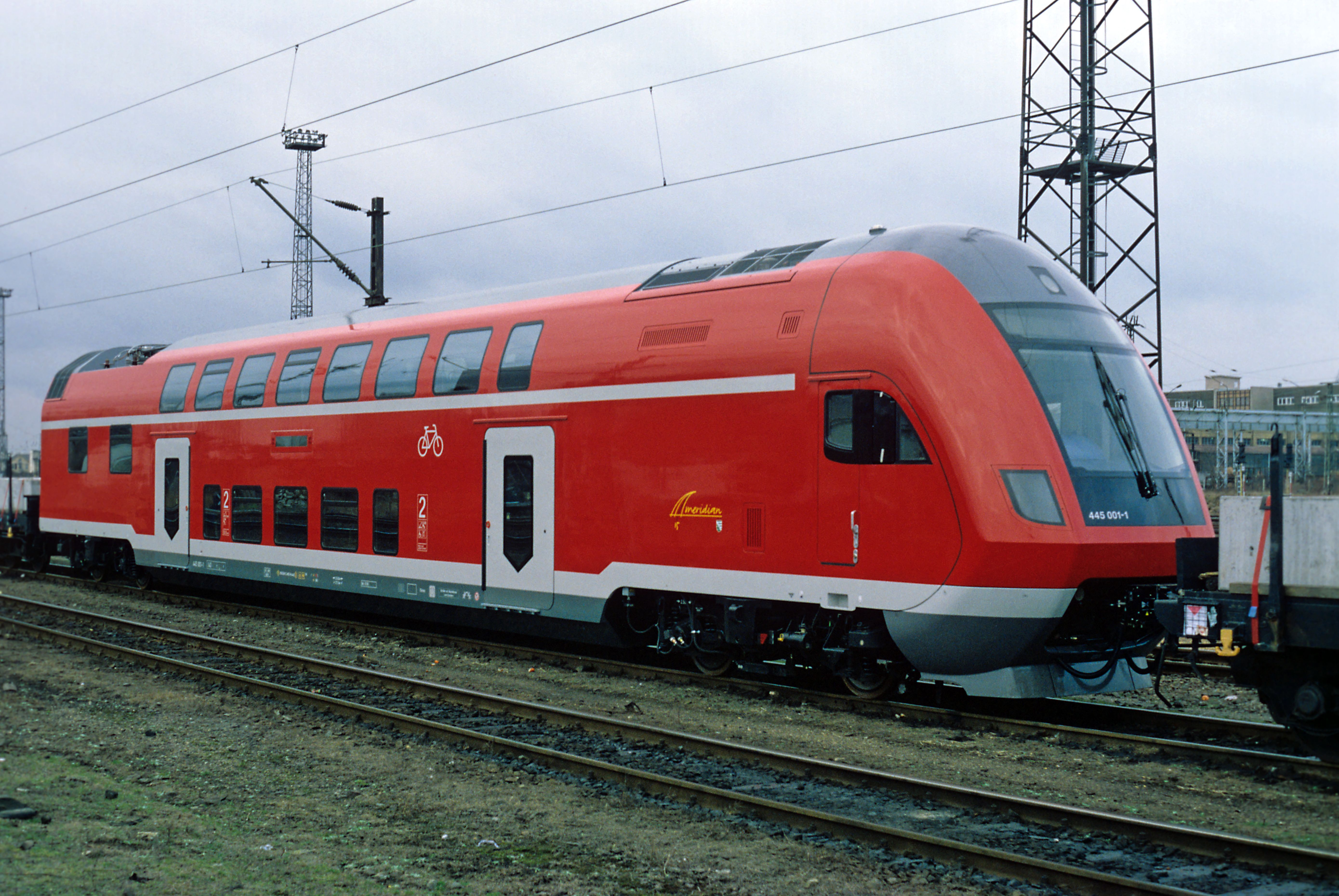 »Meridian«-Triebwagen mit zwei Kuppelwagen bei einer Überführung in Leipzig-Engelsdorf